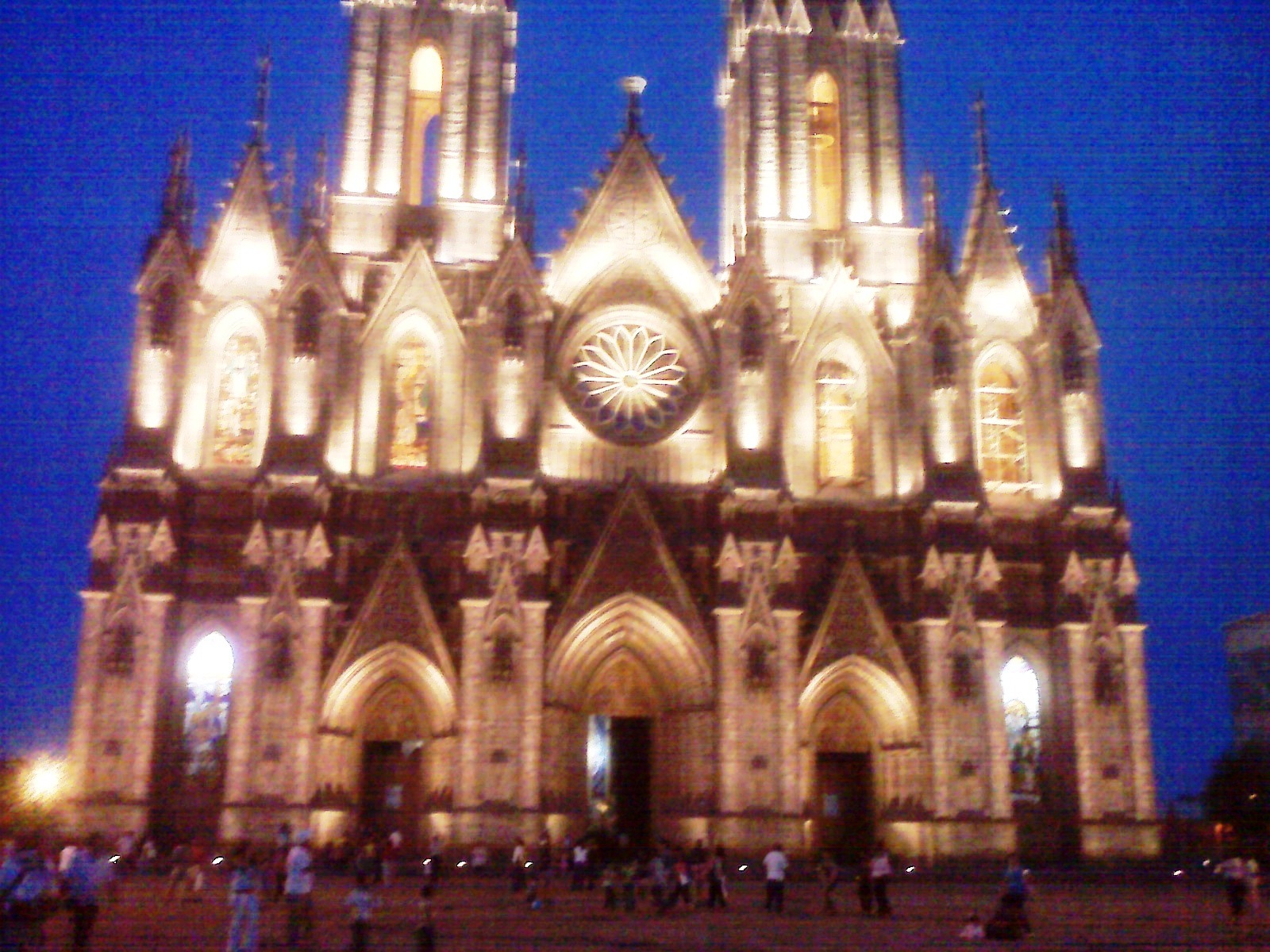 es el santuario guadalupano iluminado